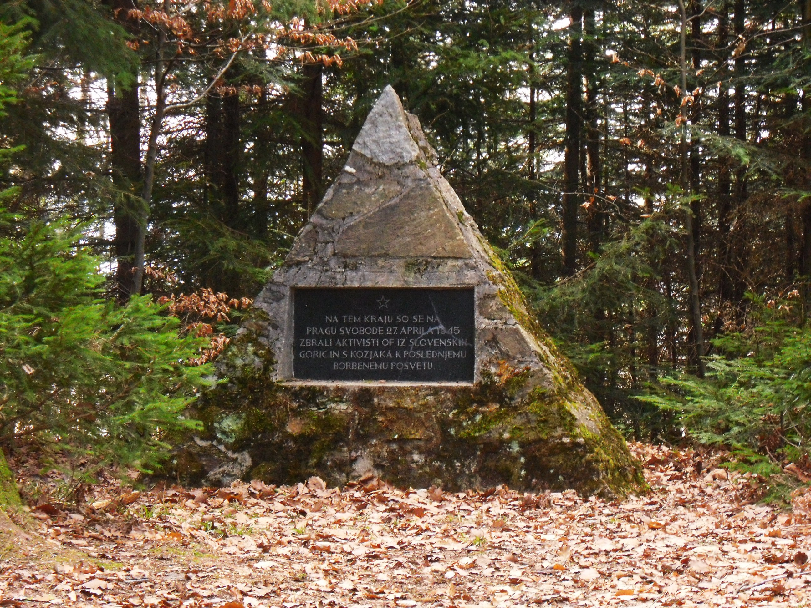 Tojzlov vrh, 705 m